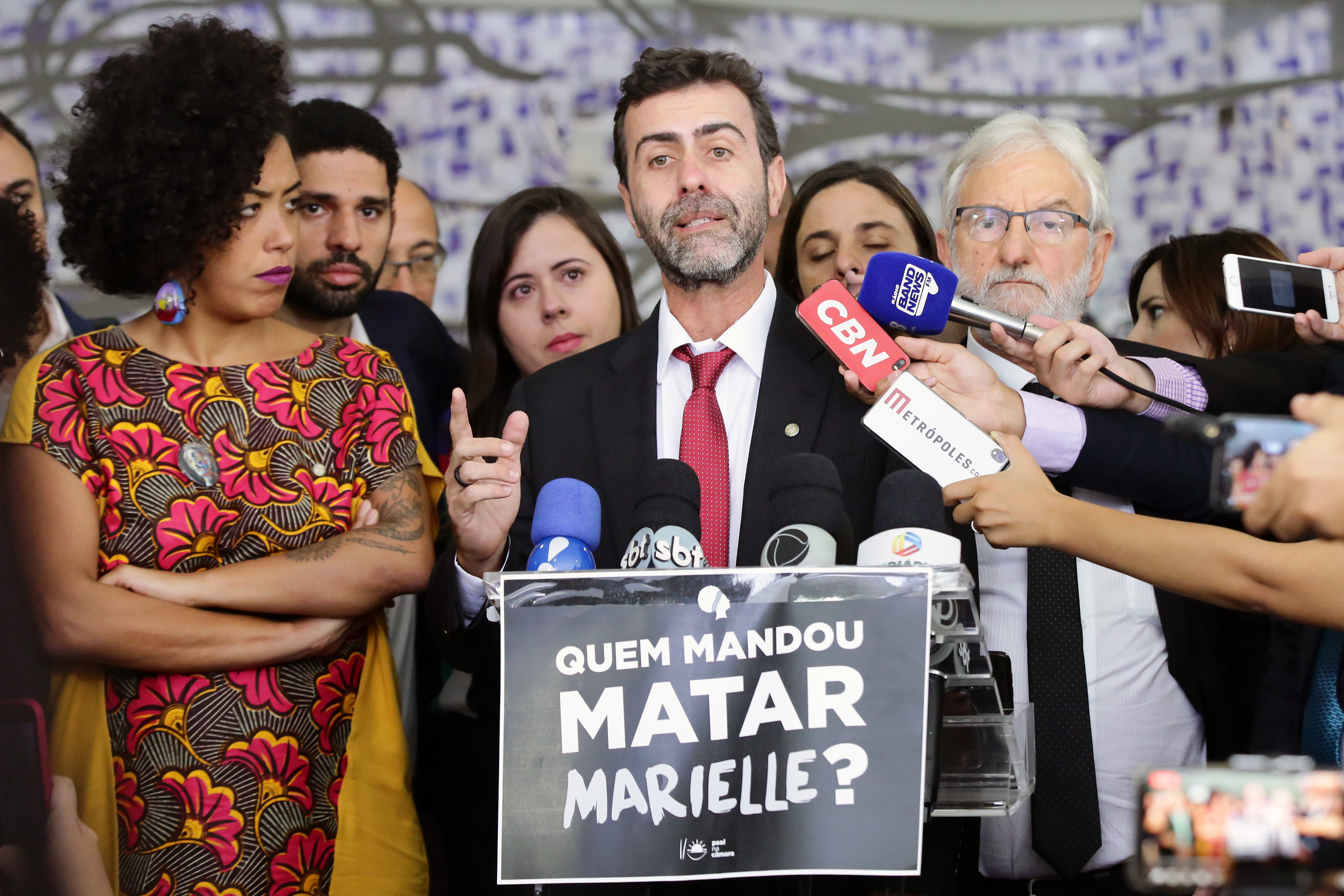 Coletida de imprensa sobre o caso Marielle Franco. Dep. Marcelo Freixo (PSOL - RJ)